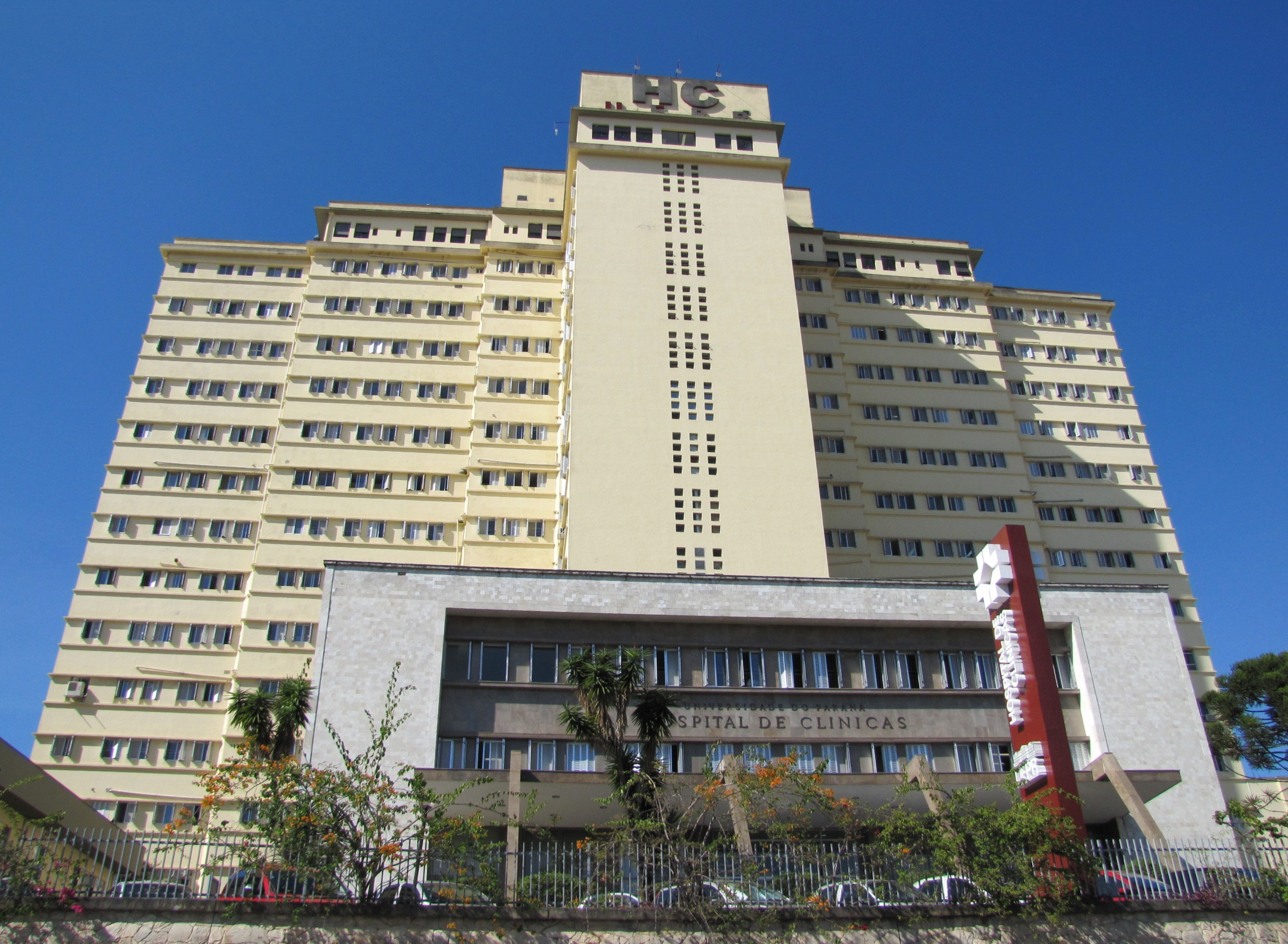 Hospital de Clínicas da Universidade Federal do Paraná.